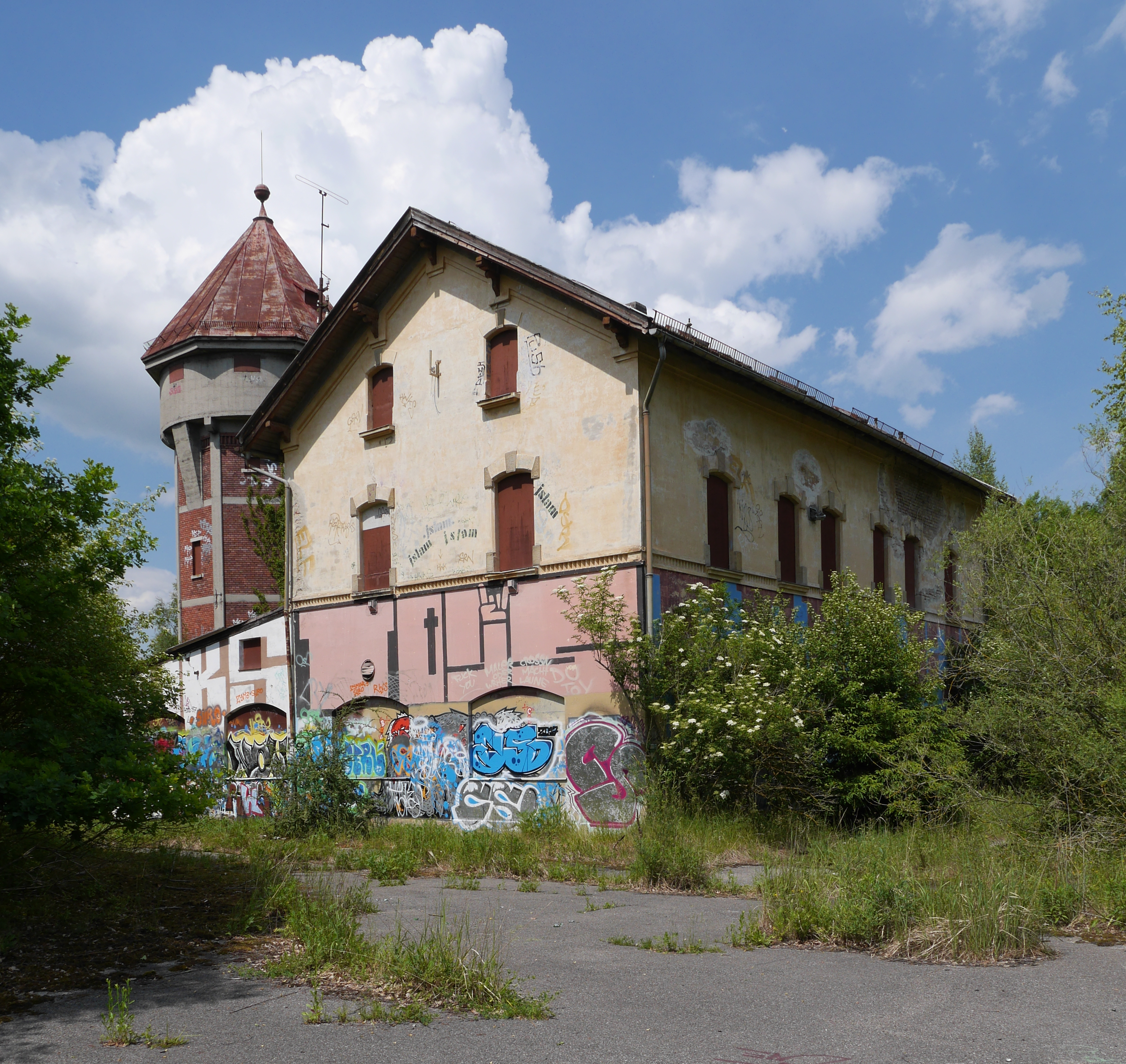 Denkmalgeschütztes Dienstgebäude des Schwellenwerks Kirchseeon von 1895, von der Südseite, im Hintergrund links der Wasserturm This is a photograph of an architectural monument.